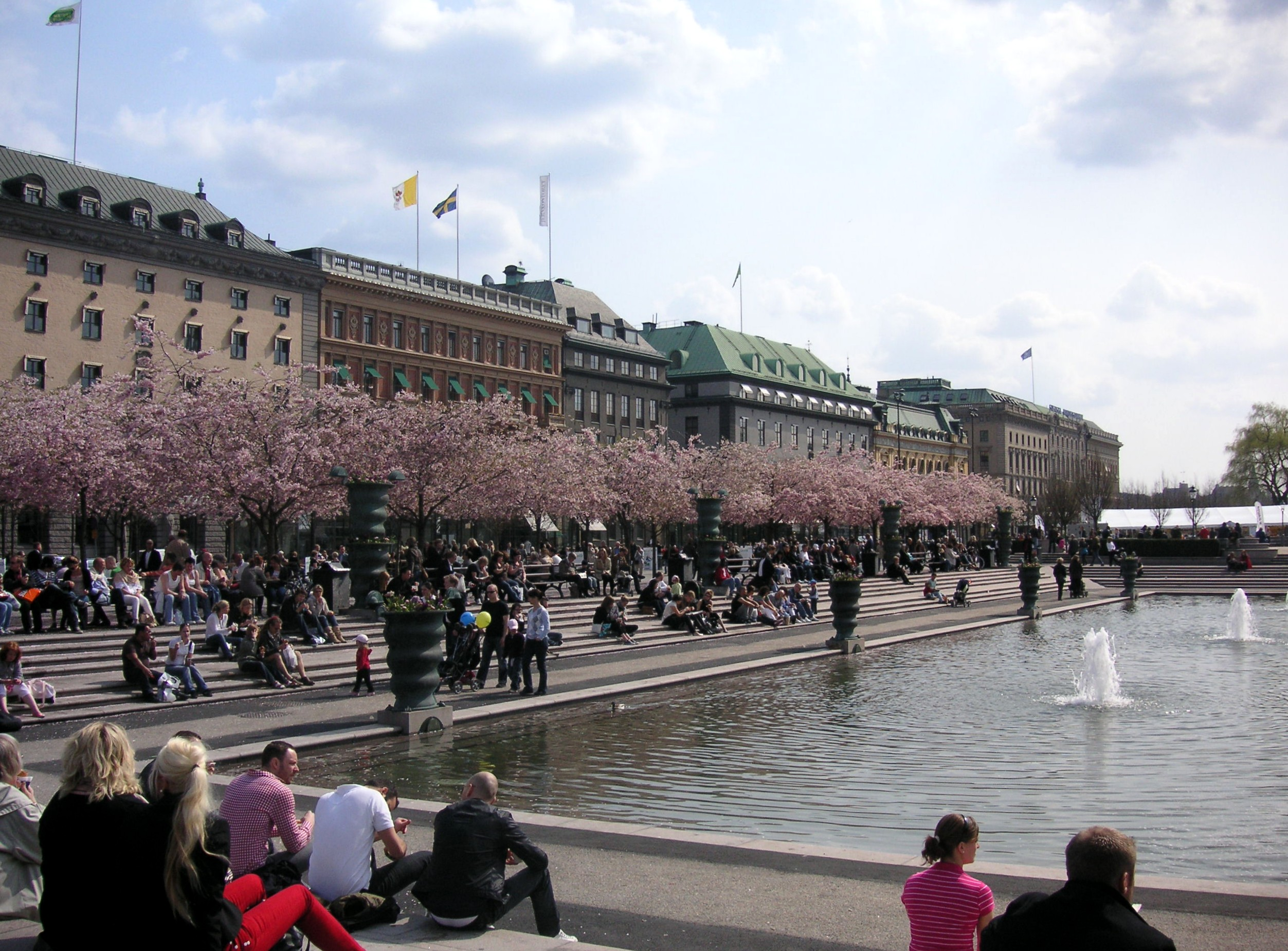 Kungsträdgården i Stockholm på våren